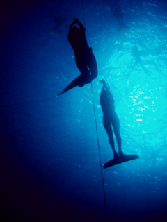 Freitaucher beim Tieftauchen mit Monoflossen